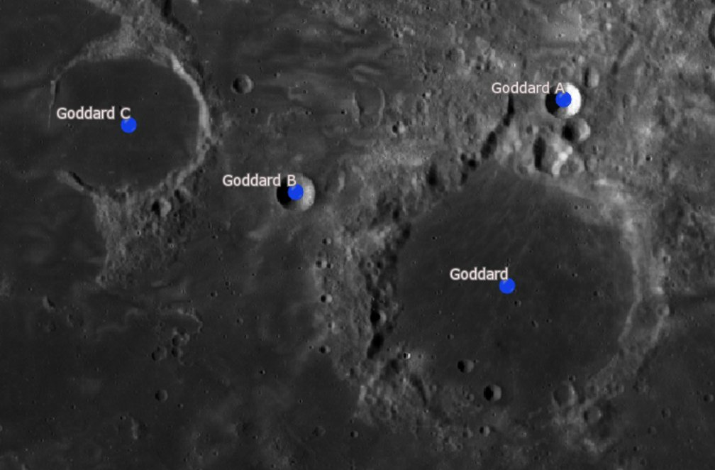 Cráter lunar Goddard. Cráteres satélite (Imagen LRO)